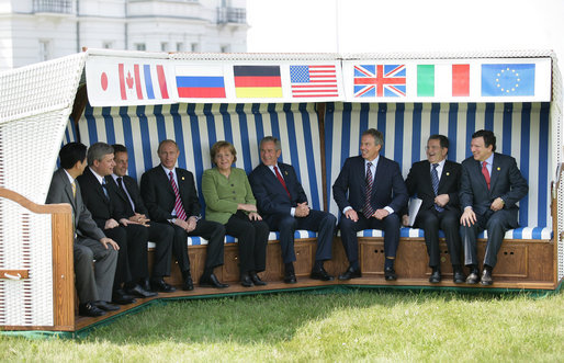 Die Teilnehmer des G8-Gipfels in Heiligendamm am 7. Juni 2007. Von links nach rechts: Shinzō Abe (japanischer Premierminister), Stephen Harper (Premierminister von Kanada), Nicolas Sarkozy (Staatspräsident der Französischen Republik), Wladimir Putin (Präsident Russlands), Angela Merkel (Bundeskanzlerin der Bundesrepublik Deutschland), George W. Bush (Präsident der Vereinigten Staaten von Amerika), Tony Blair (Premierminister des Vereinigten Königreichs), Romano Prodi (italienischer Ministerpräsident) und José Manuel Barroso (Präsident der Europäischen Kommission).